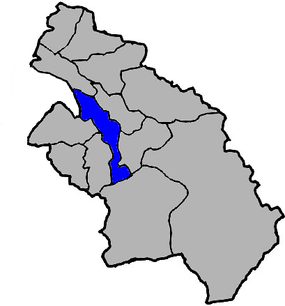 中華民國臺灣省新竹縣竹東鎮，KJ (talk)繪製。